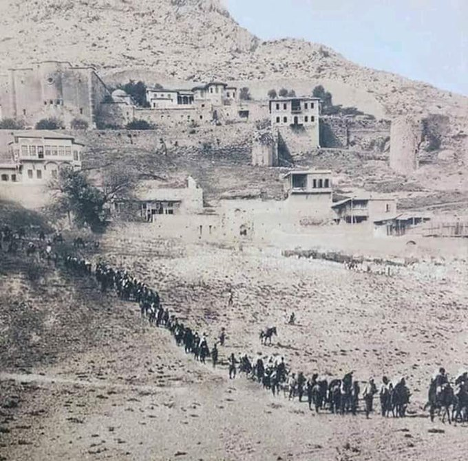 Ermeni Soykırımı sırasında Kozan Sancak'ından tehcirler